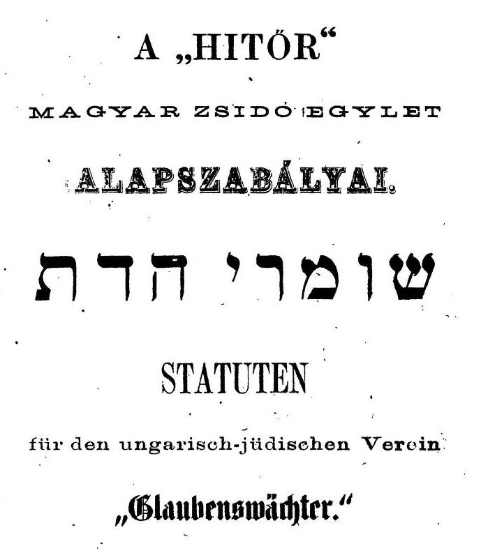 Regulations codex of the "Guardians of the Faith", a Jewish Orthodox organization in Hungary, published March 1868.